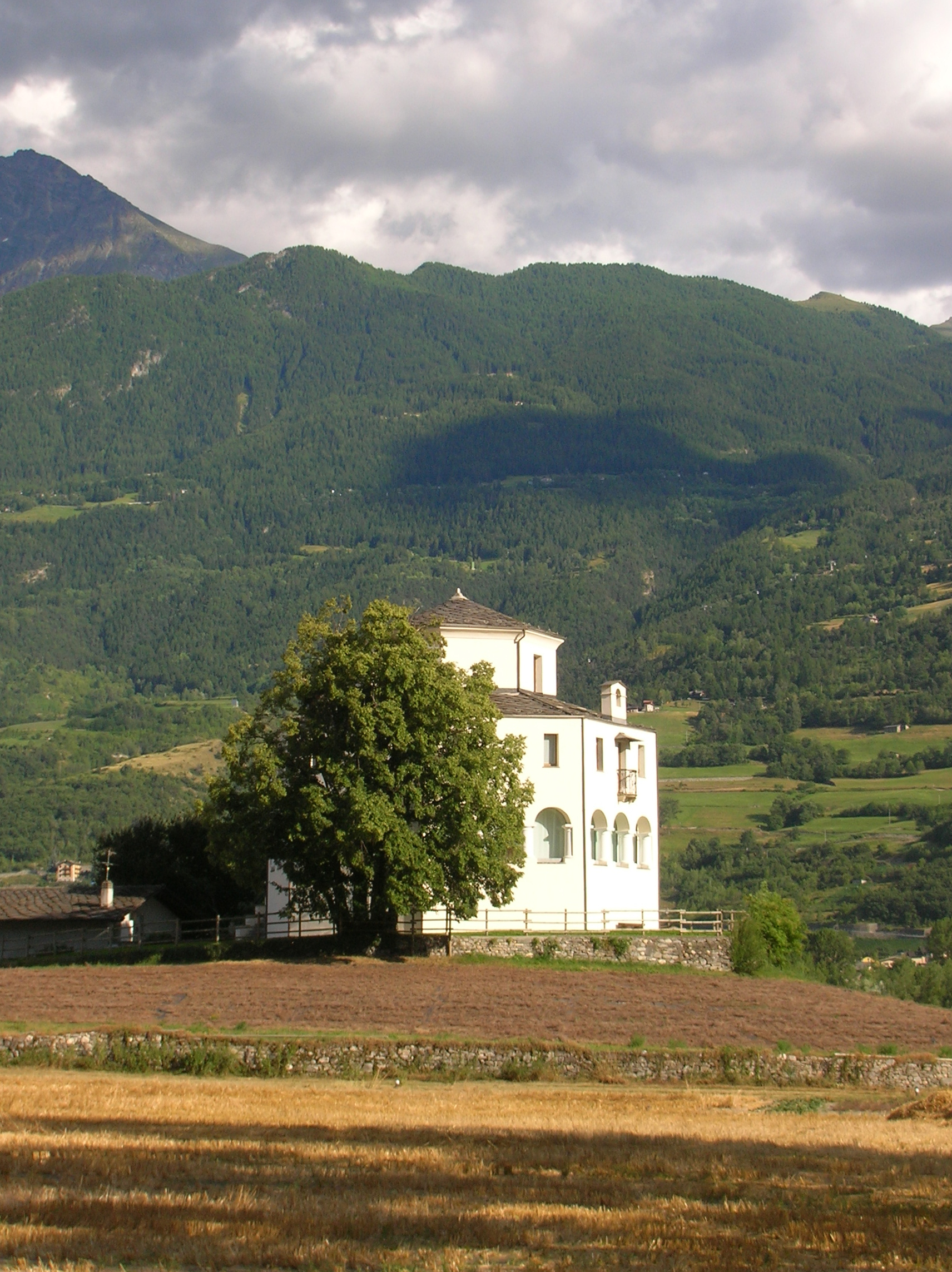 Castello di Montfleury, Aosta, Valle d'Aosta, Italia.